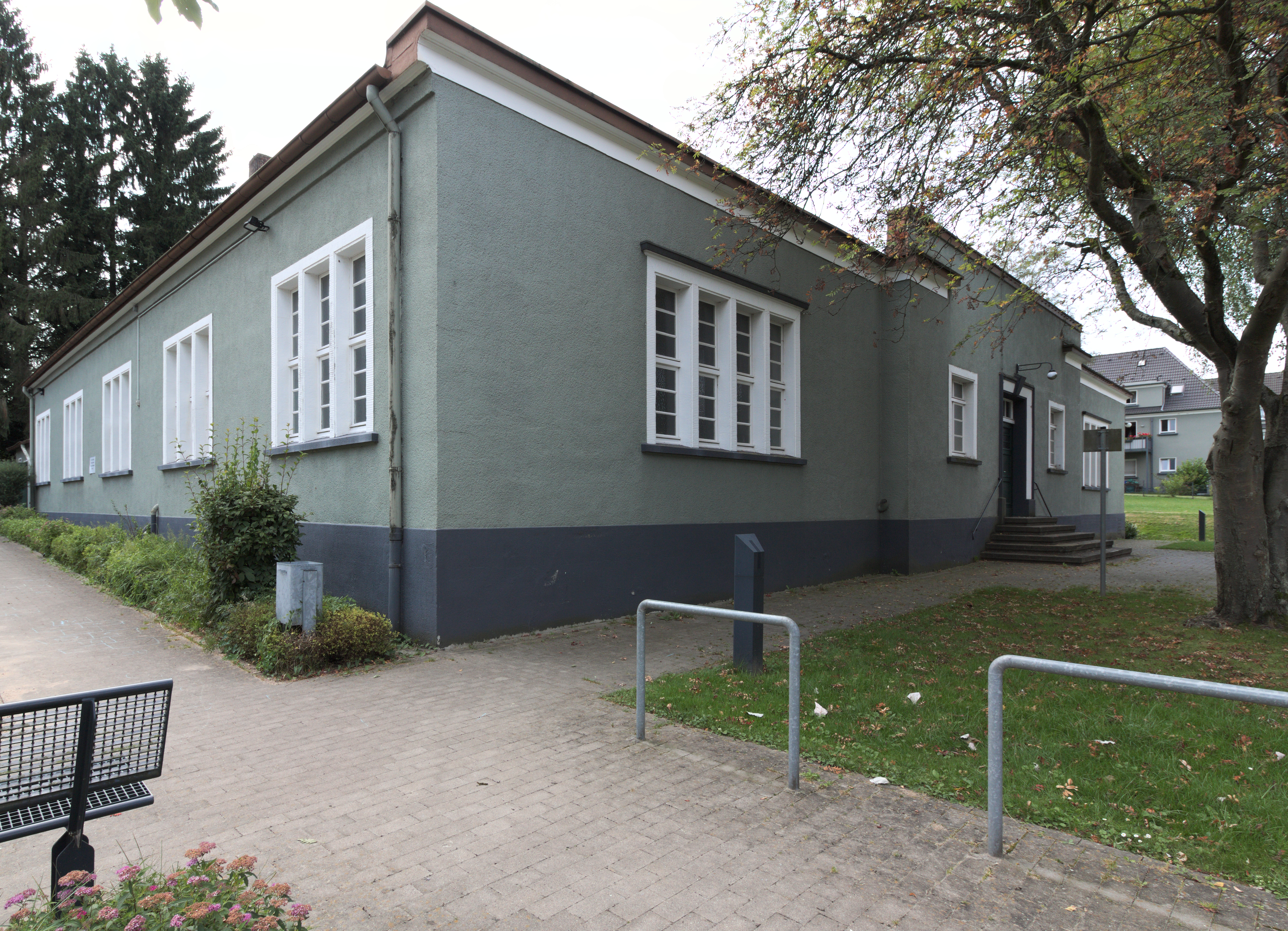 Ehemaliges Waschhaus der Siedlung Weegerhof in Solingen-Höhscheid This is a photograph of an architectural monument.